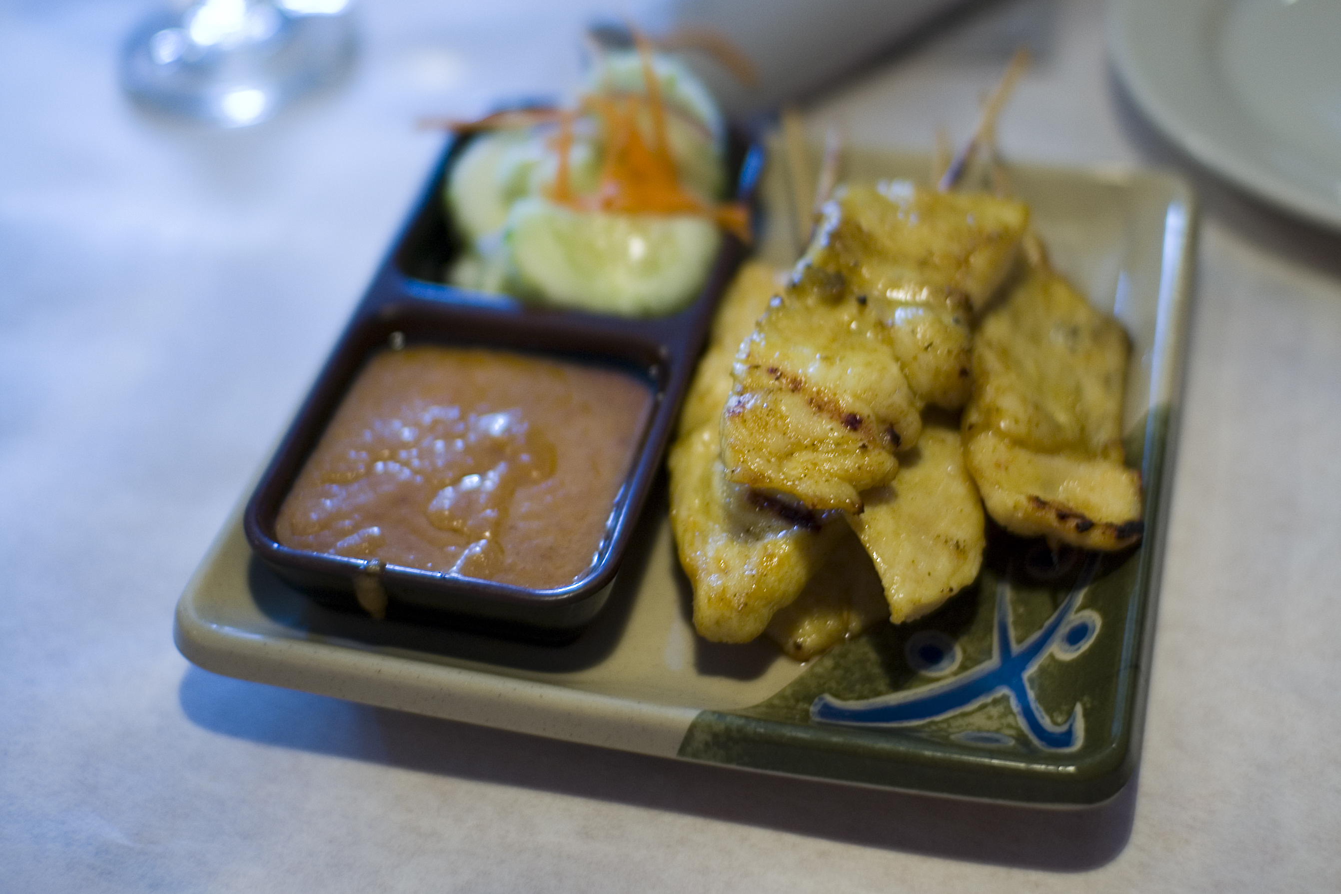 from dinner last night